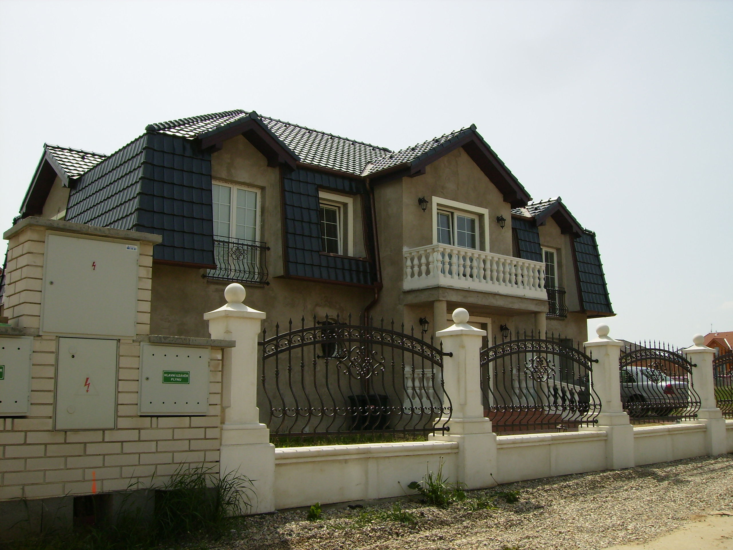 "Podnikatelské baroko" v Šestajovicích u Prahy.